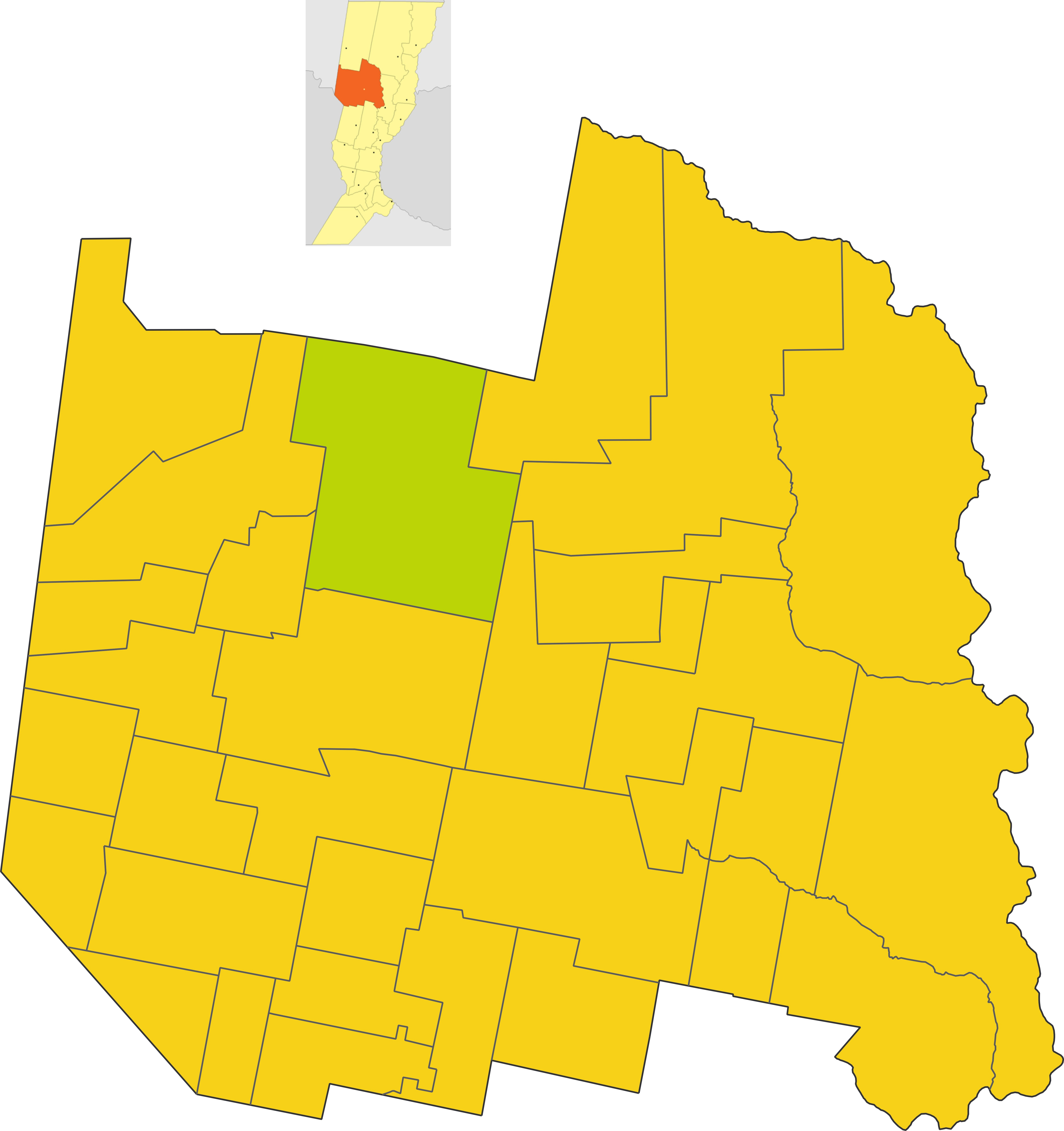 Map of the comuna de Ambrosetti in San Cristobal department, Santa Fe province, Argentina